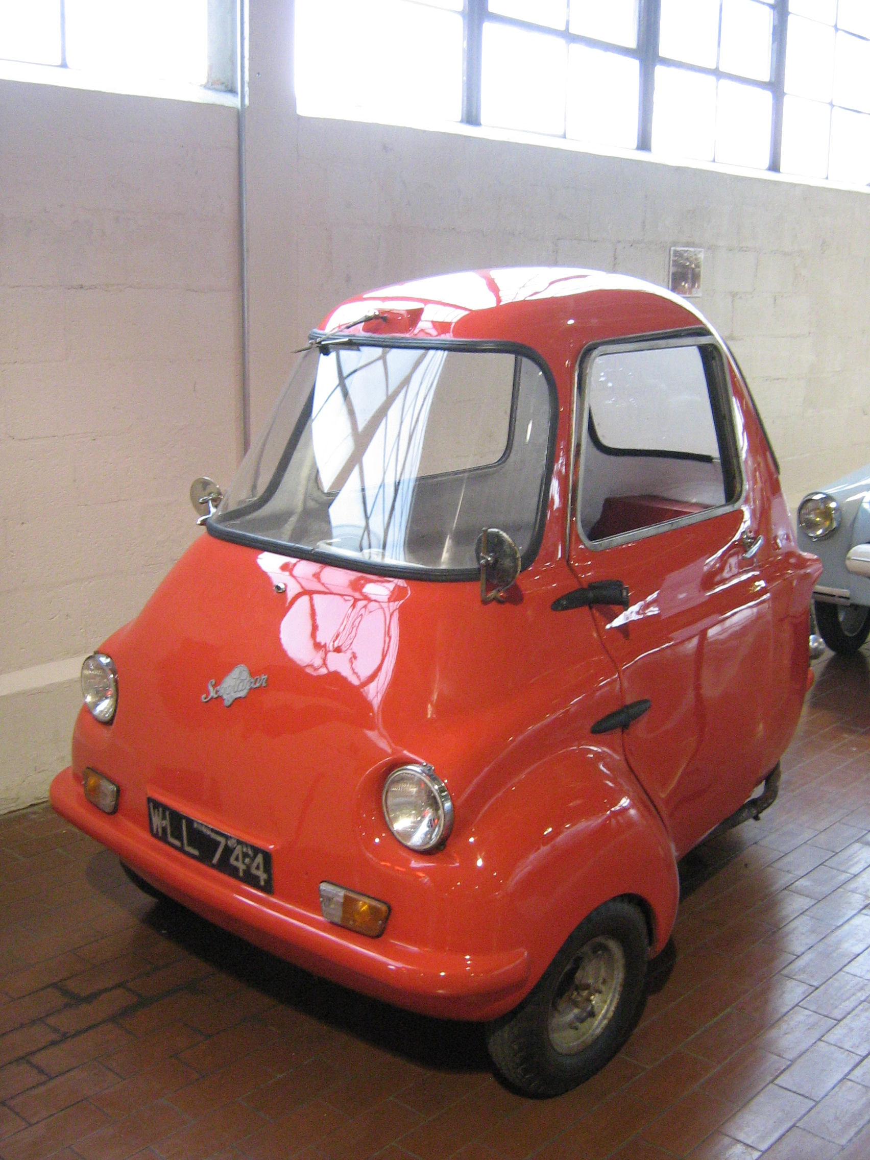 1959 Scootacar